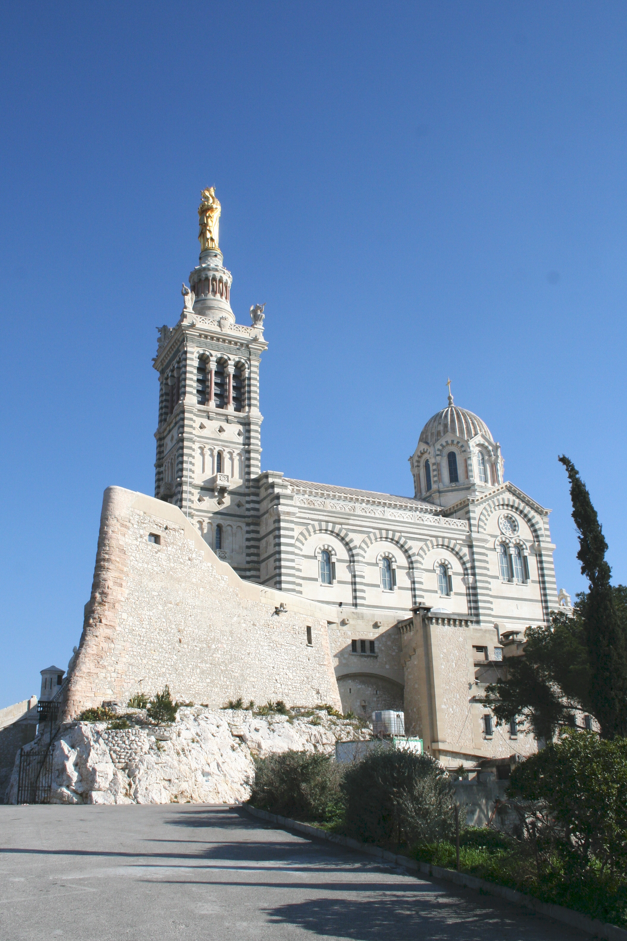 Notre-Dame de la Garde, éperon de l'acien fort militaire.